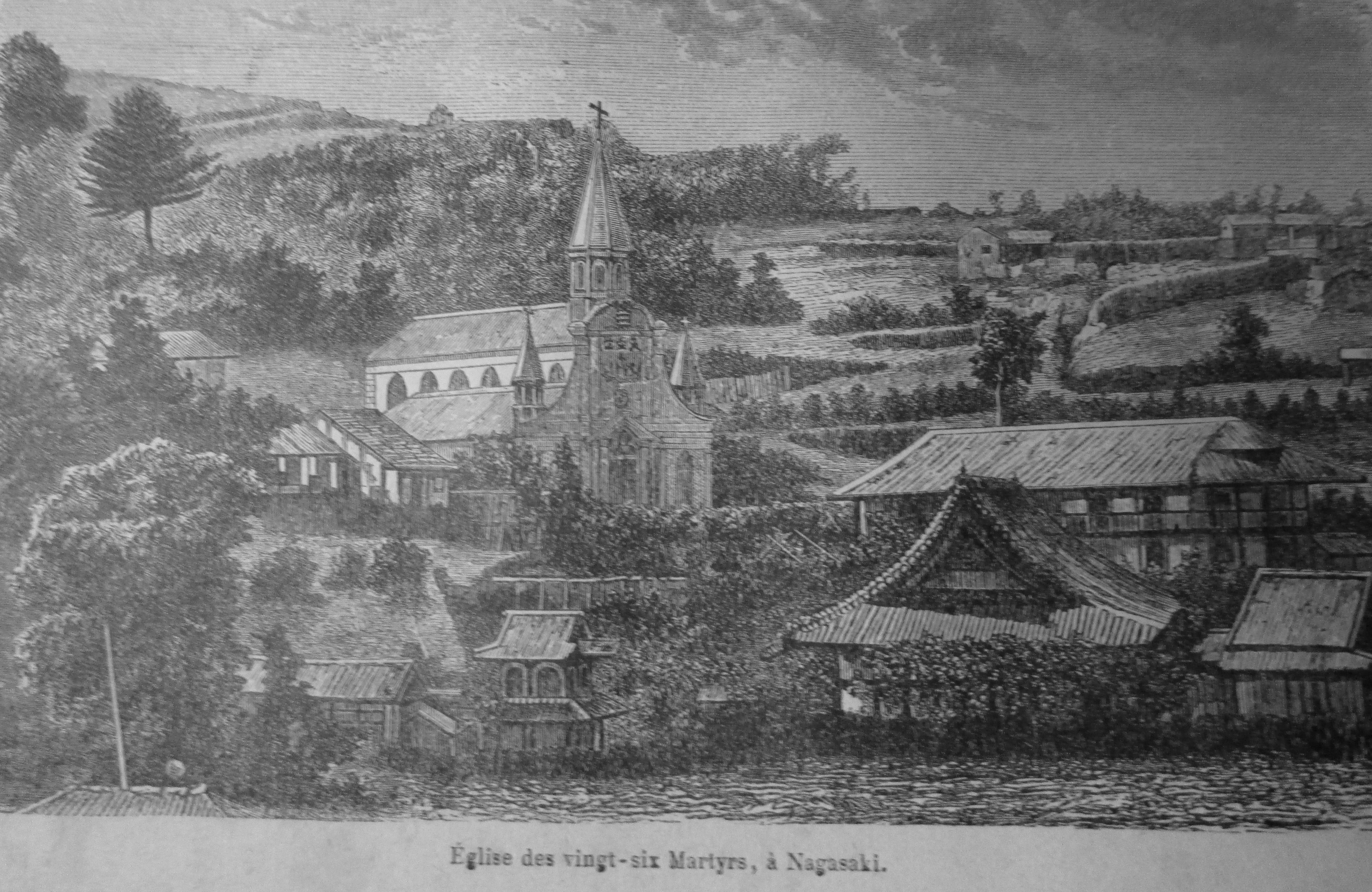 Église des Vingt-Six-Martyrs à Nagazaki vers 1885, in Les Missions d'Extrême-Orient, Mame, Tours, 1900